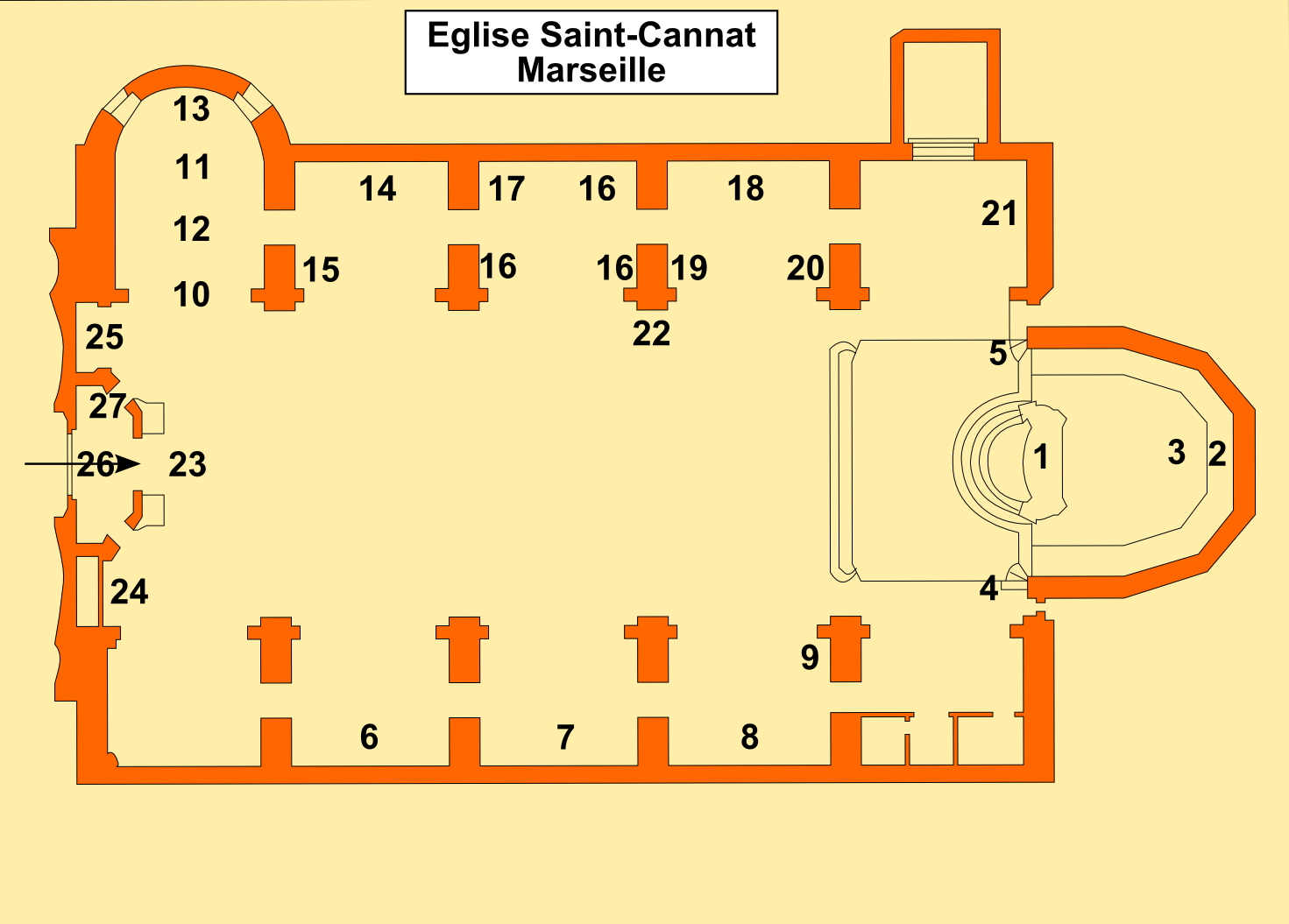 Schéma de l'église Saint-Cannat à Marseille située 4 rue des prêcheurs dans le 1er arrondissement. Dessin réalisé avec Inkscape à partir du livre "Trésors des églises de Marseille".